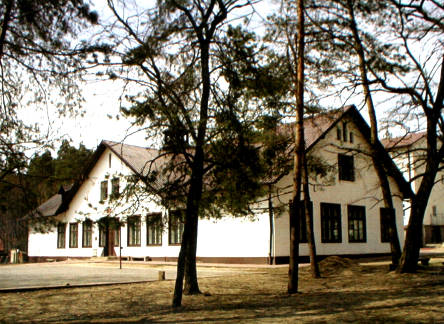 Szkoła Podstawowa Nr 1 w Majdanie Sieniawskim